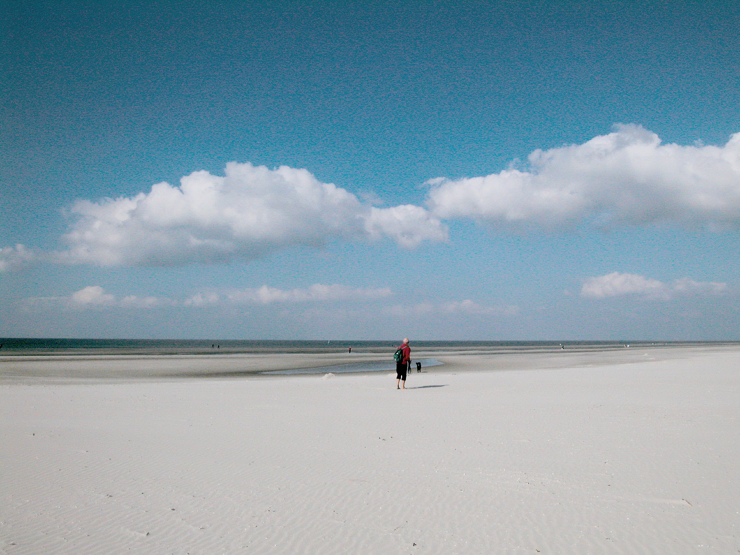 einsame Strand- und Wattwanderung im Herbst